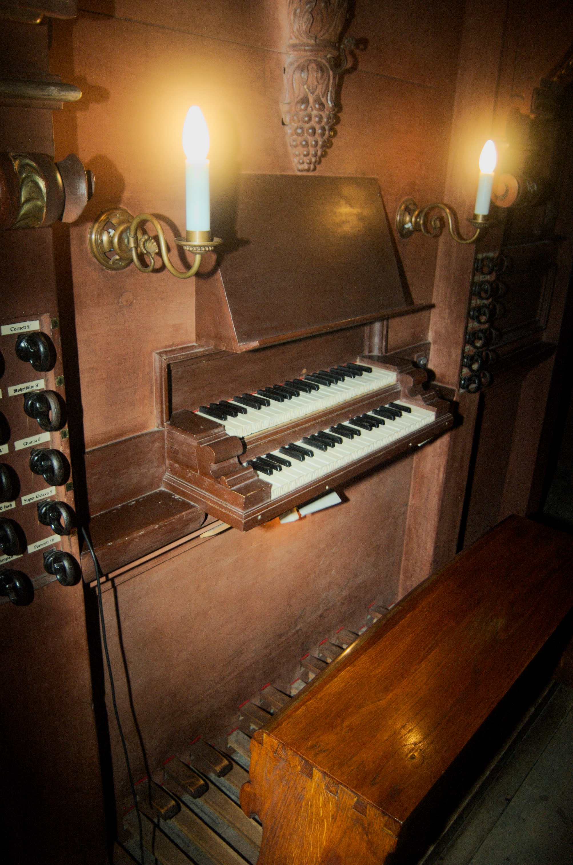 Organy Hansa Hummla w Olkuszu